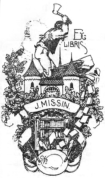 Экслибрис Рихарда Зариньша